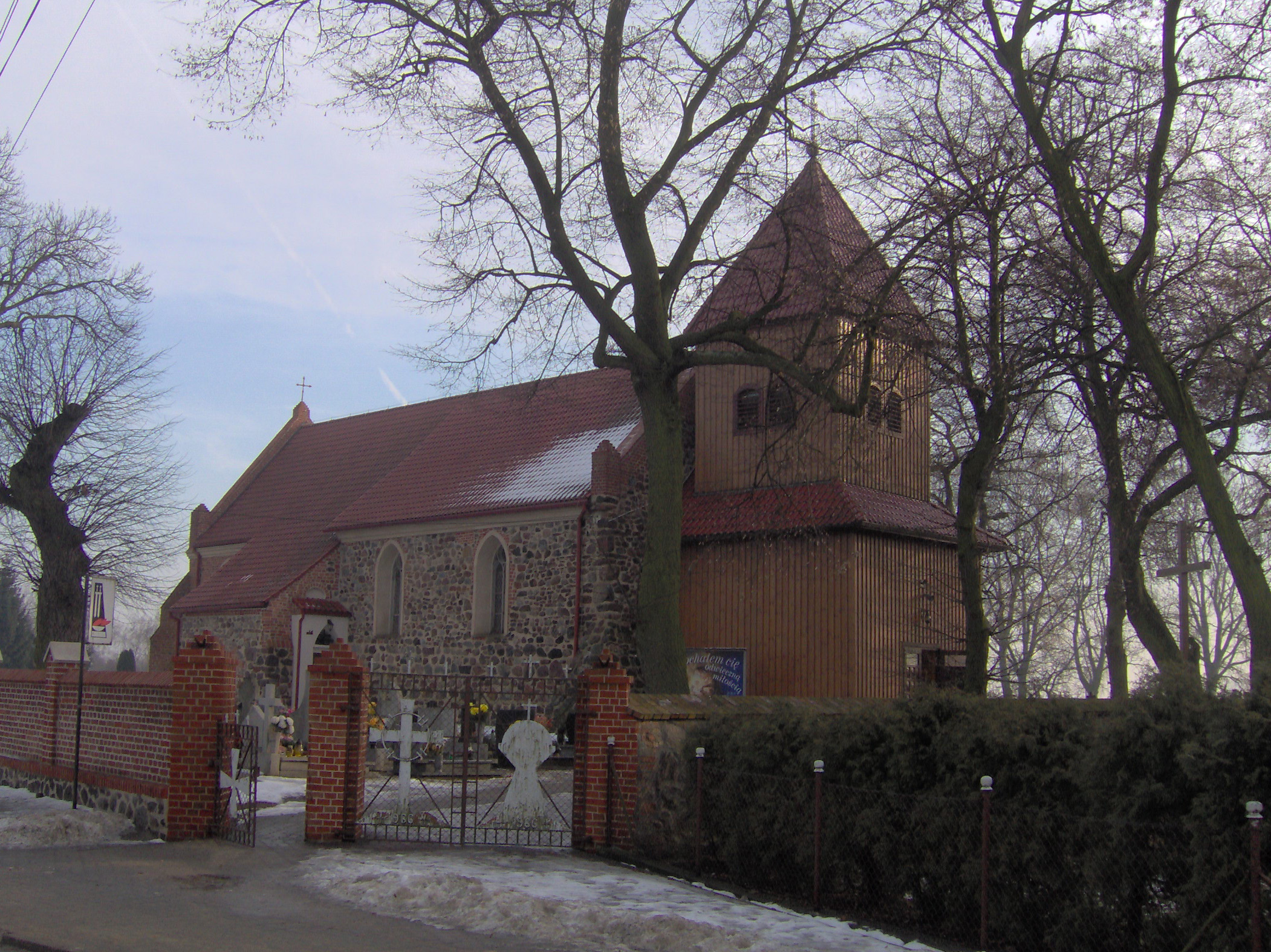 Church in Kijewo Królewskie